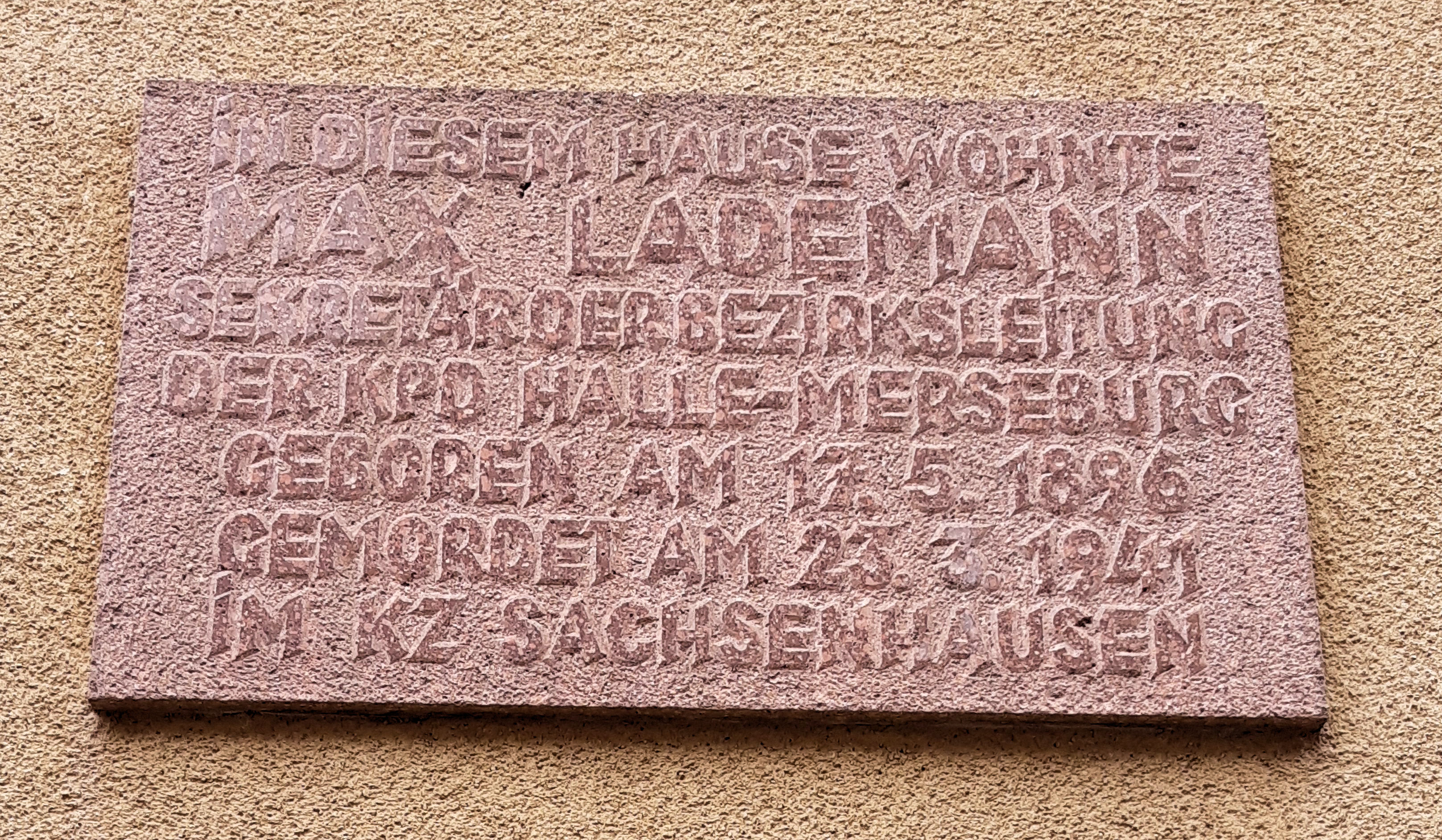 Tafel zum Gedenken an Max Lademann an seinem Wohnhaus Stadtgutweg 27, Halle (Saale)